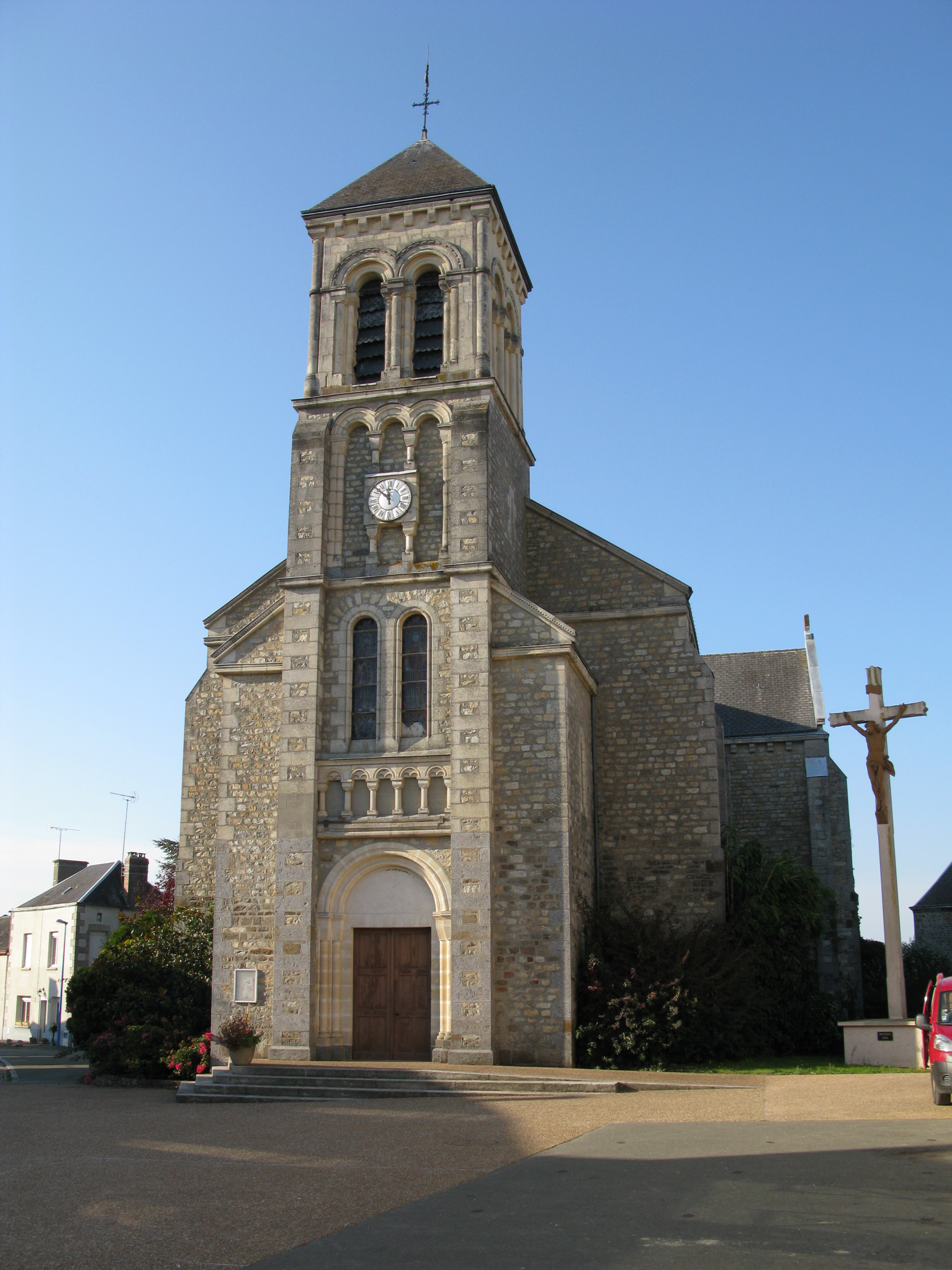 L'église du Ribay